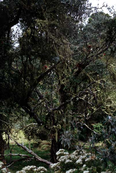 Tropischer Nebelwald in Costa Rica